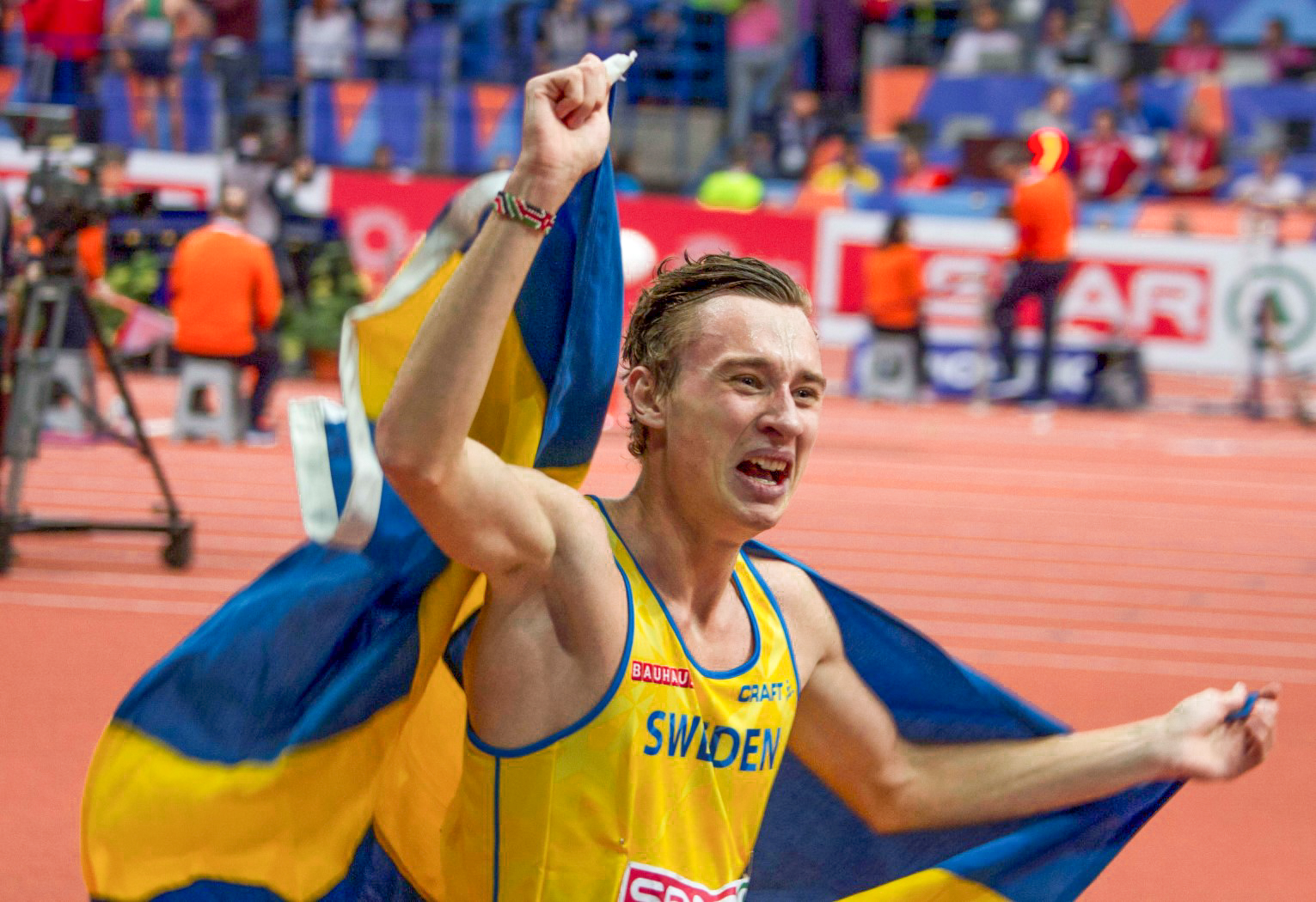 194 finale 1500m berglund